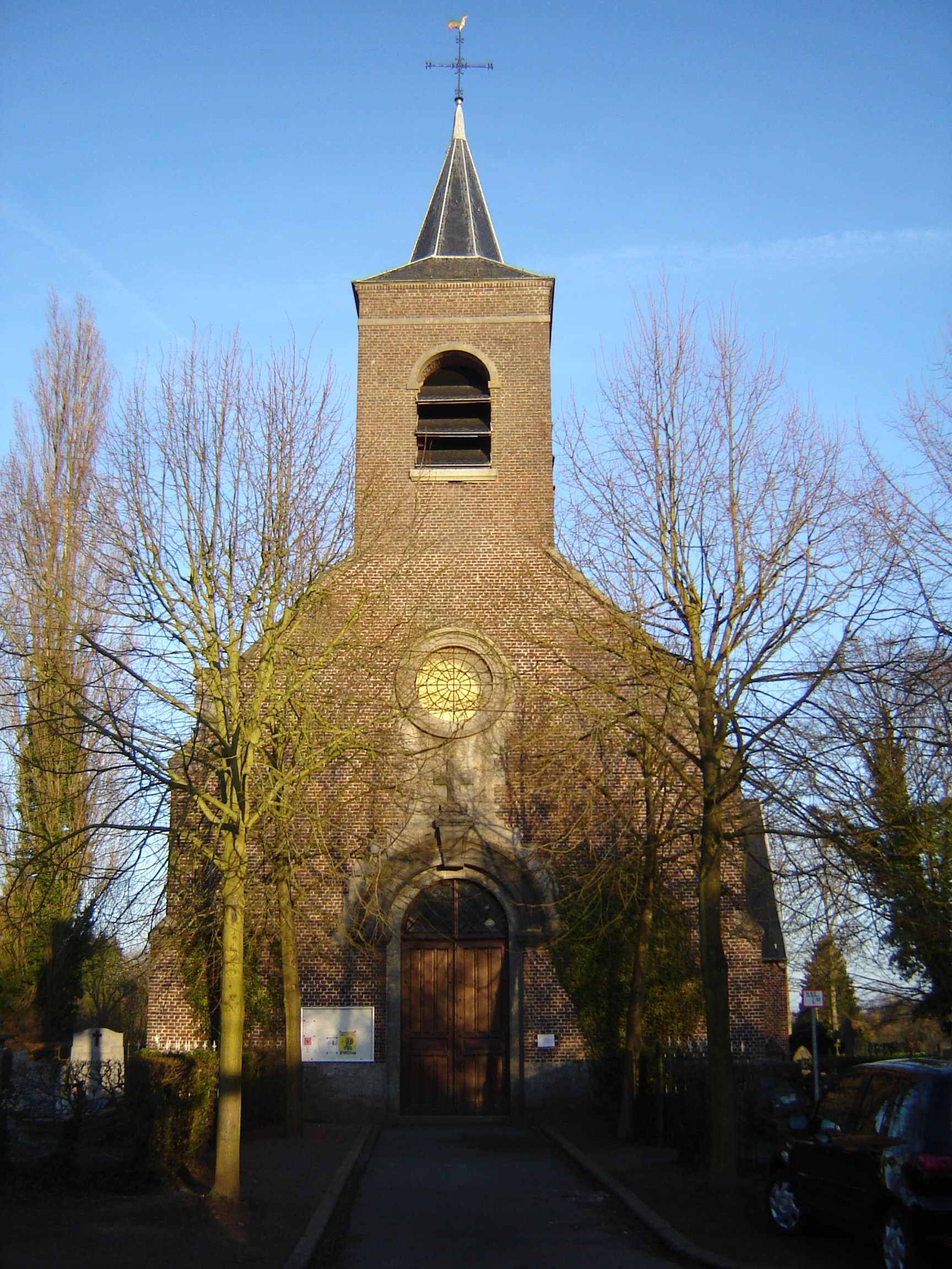 Eglise Sainte-Marie-Madeleine in Howardries, Hainaut, Belgium